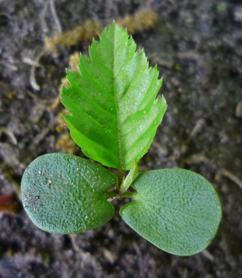 Keimling einer Hainbuche mit den beiden typischen linsenförmigen Keimblättern